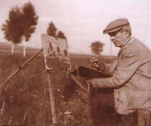 Dvořák Josef (1883-1967), český malíř, tkadlec a kreslič textilních vzorů